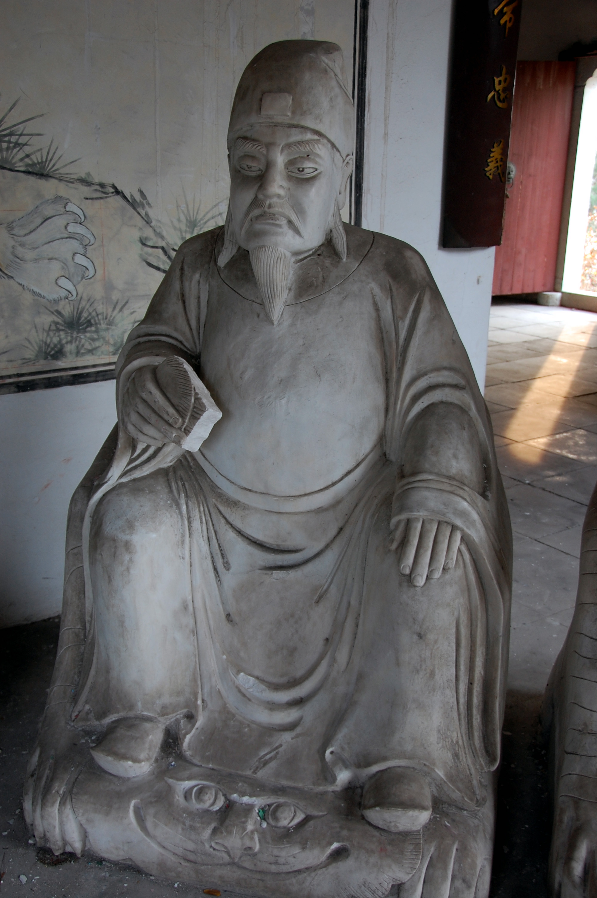 清明上河図/清明上河图